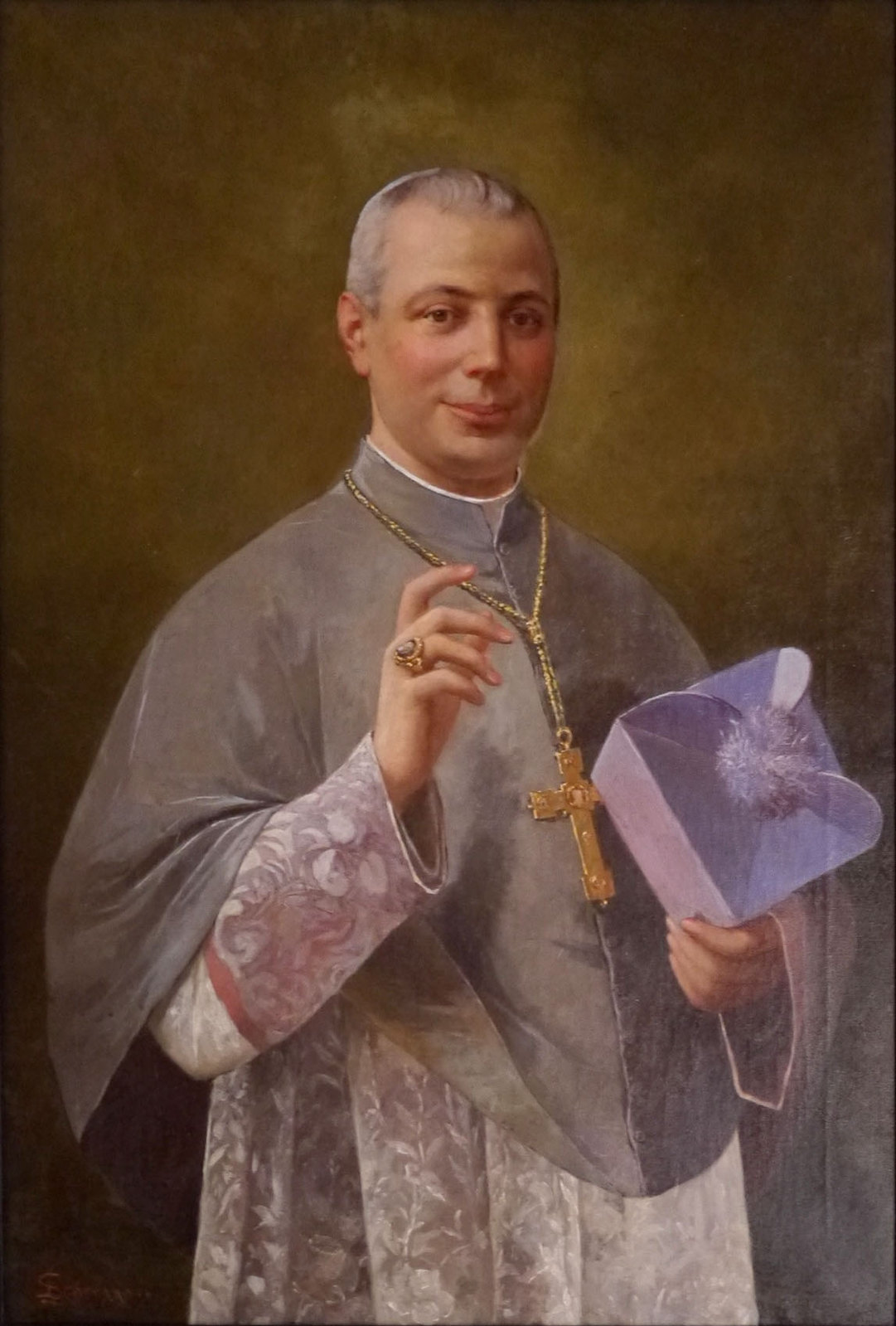 Tommaso Valeri, olio su tela, XX secolo. Provenienza: Basilica Cattedrale, Brindisi. Ritratto dell’arcivescovo metropolita di Brindisi e amministratore apostolico di Ostuni Tommaso Valeri